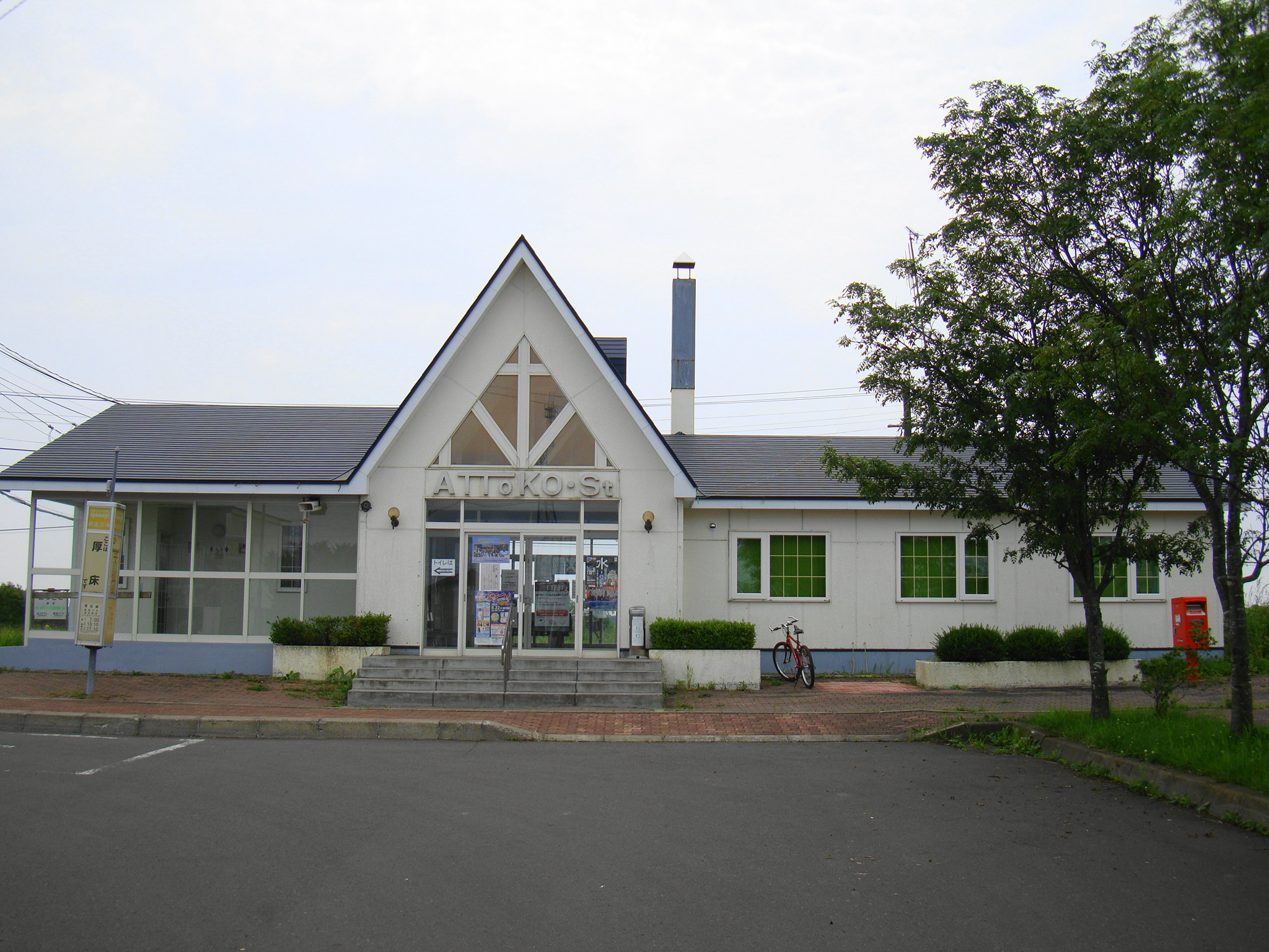 JR Attoko Station, Nemuro Kotsu Attoko depot